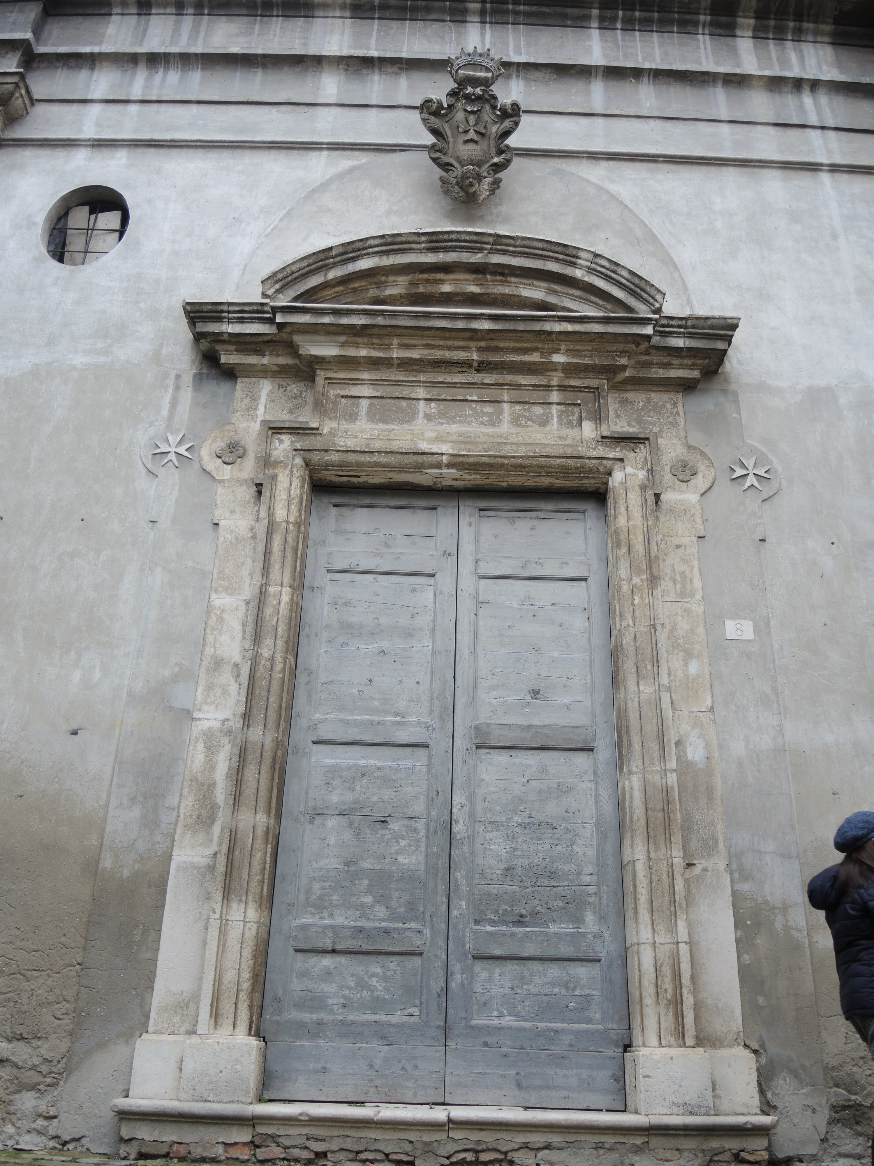 Penne: Chiesa di San Giovanni Battista